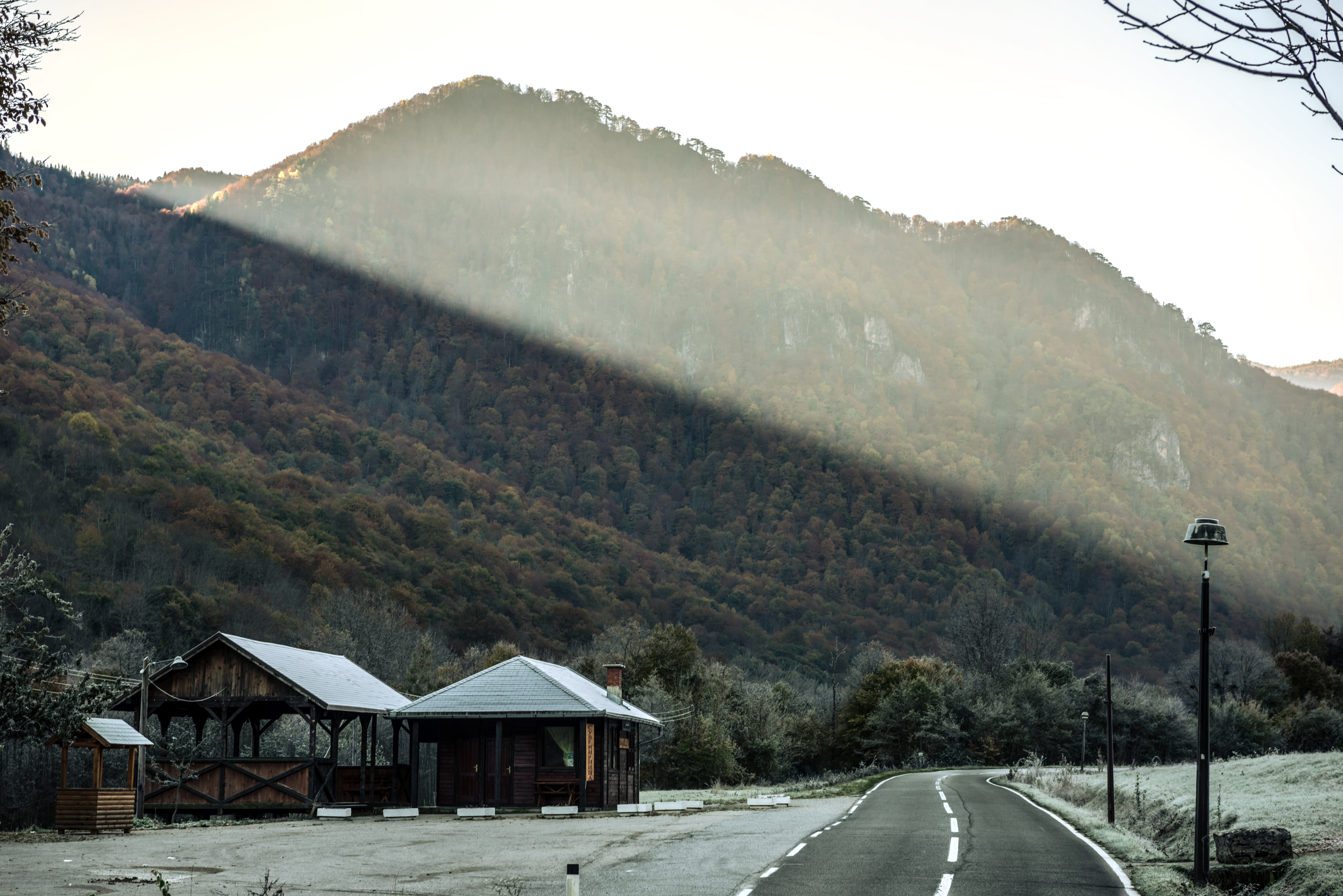 This image was uploaded as part of Trace of Soul 2016.